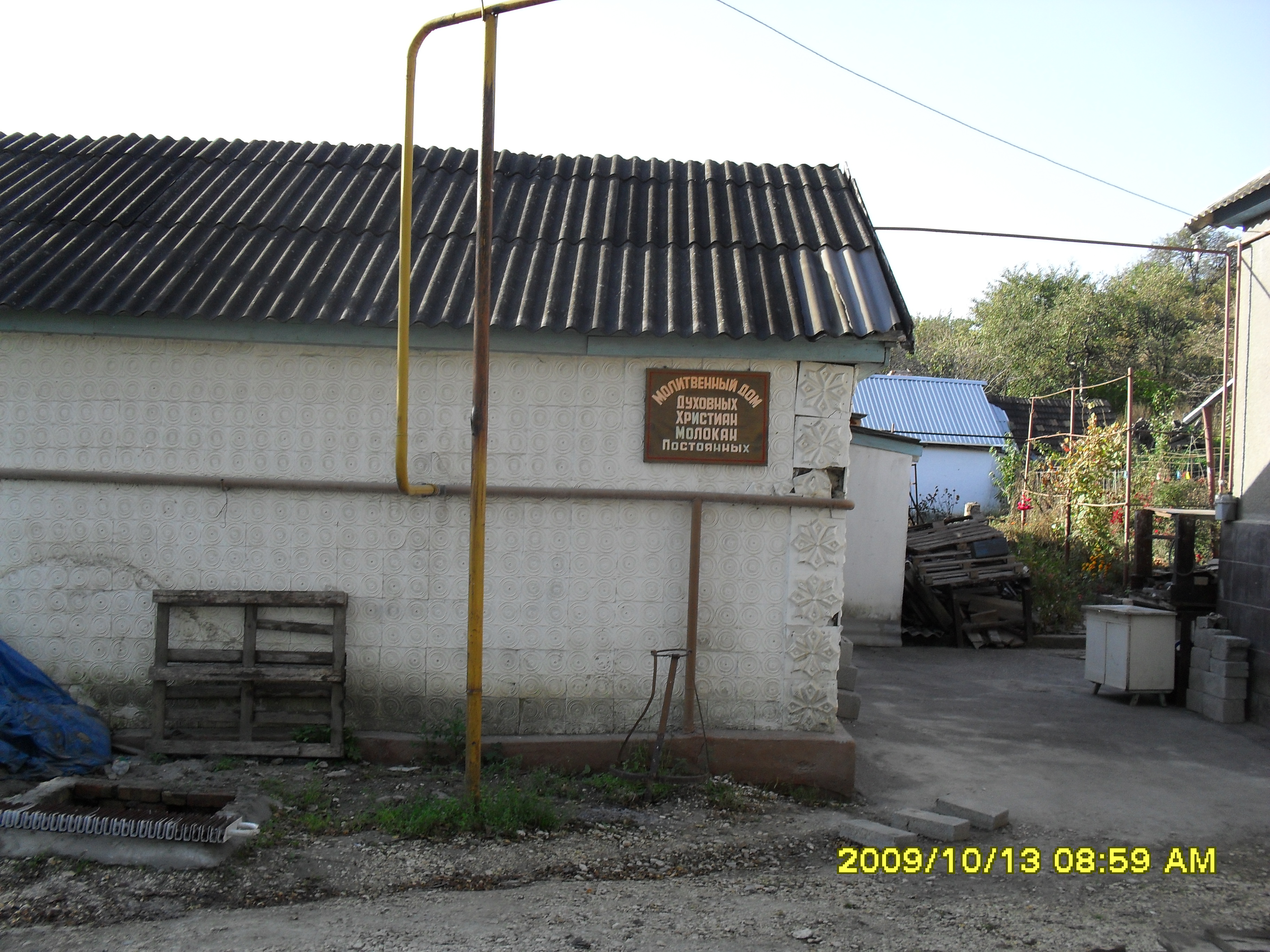 Молитвенный дом Духовных Христиан Молокан Постоянных на Юце